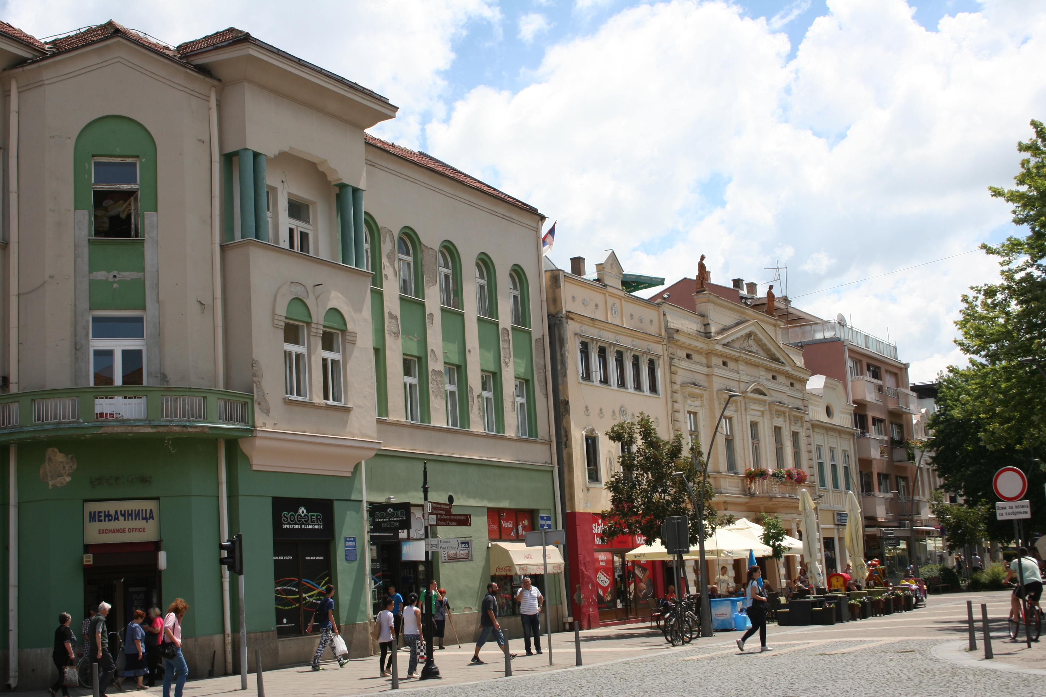 Centar grada, pogled na početak Karađorđeve ulice